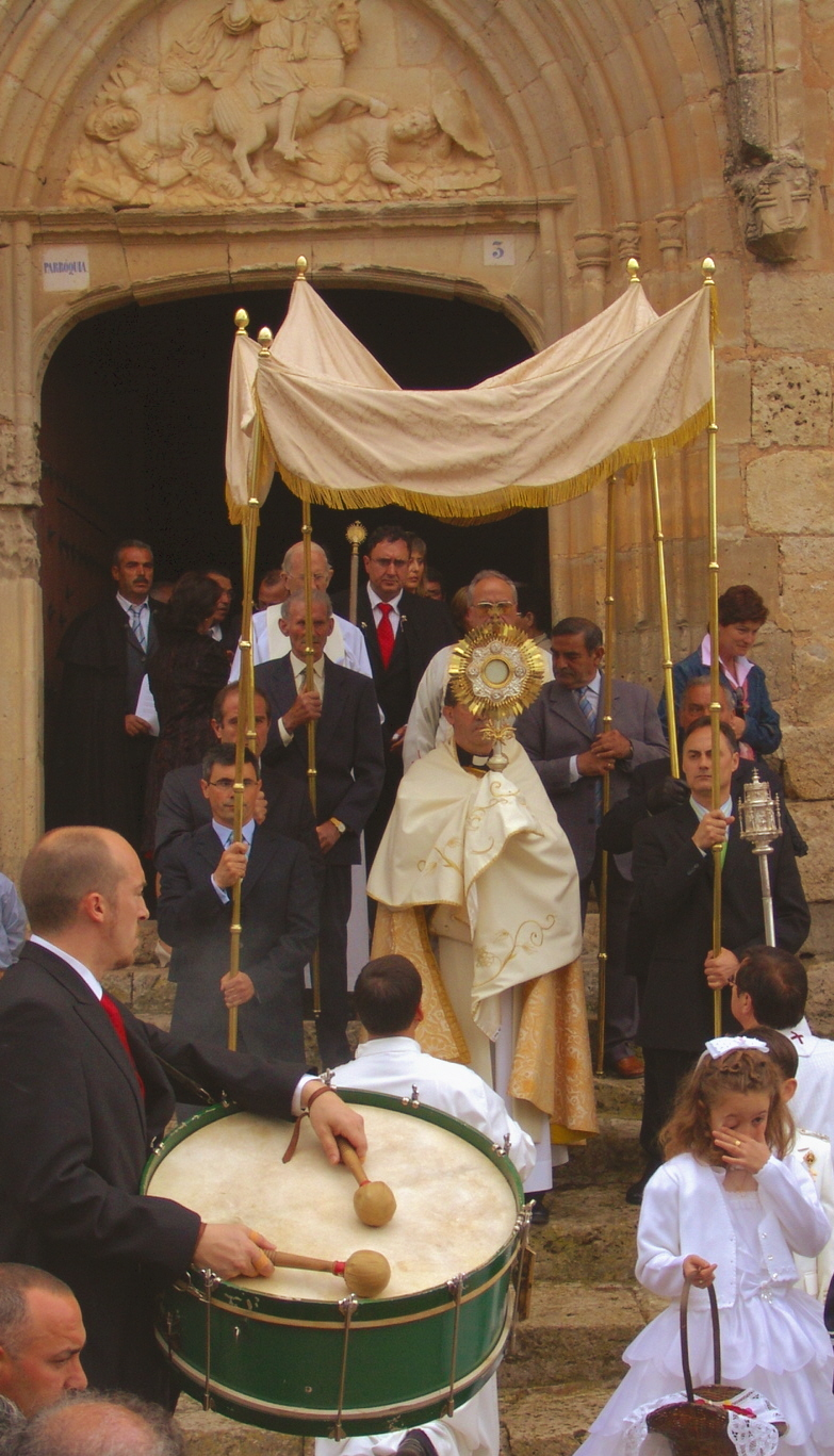 Corpus Christi, "El Colacho", Atabalero, palio y custodia, Castrillo de Murcia, Sasamón, Burgos, España